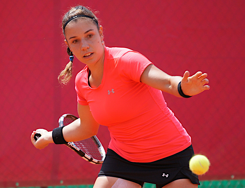 Sharon Fichman, Cagnes-sur-Mer 2013